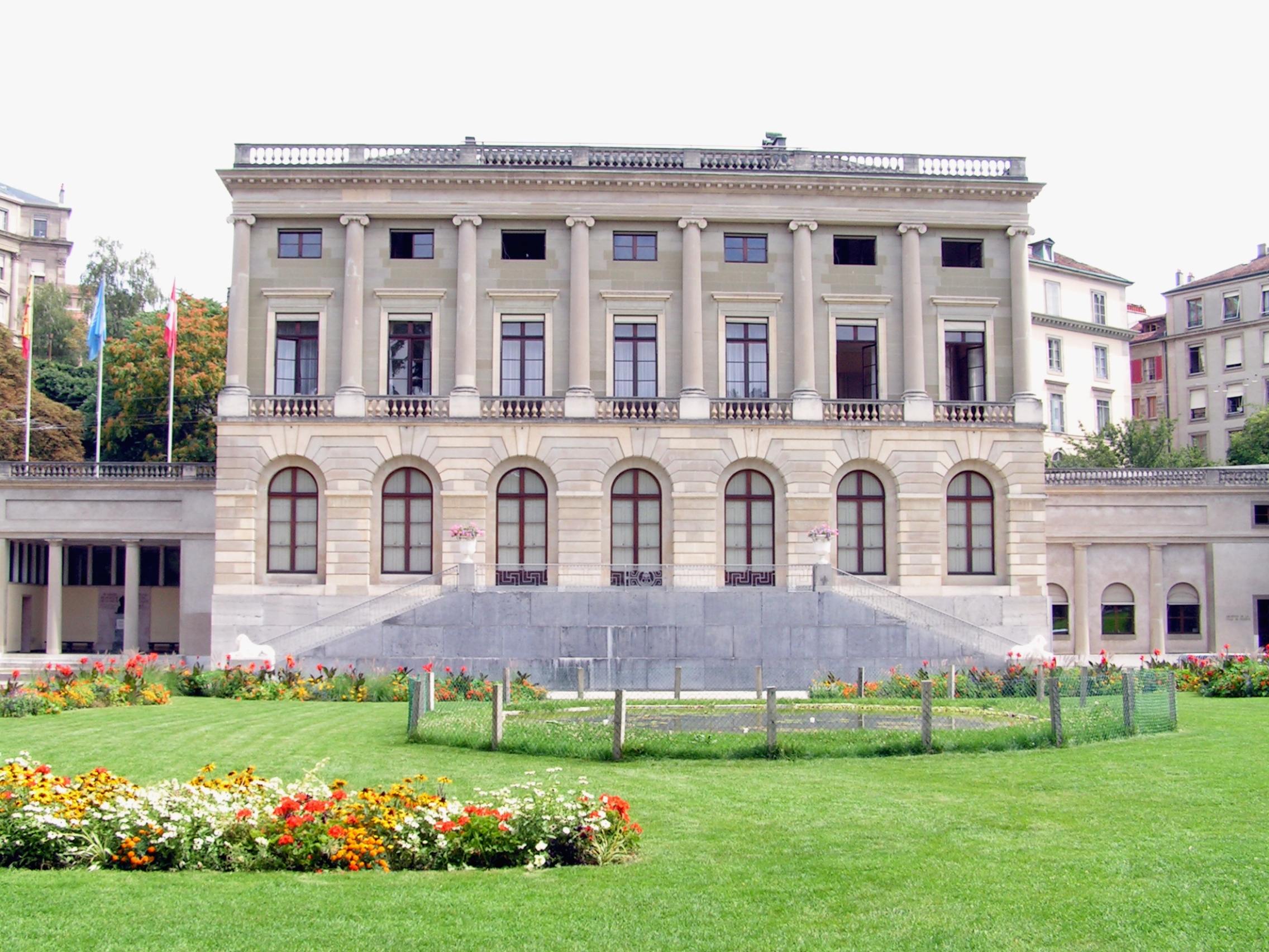 Rue de la Croix-Rouge 4, Genève. Le Palais Eynard.